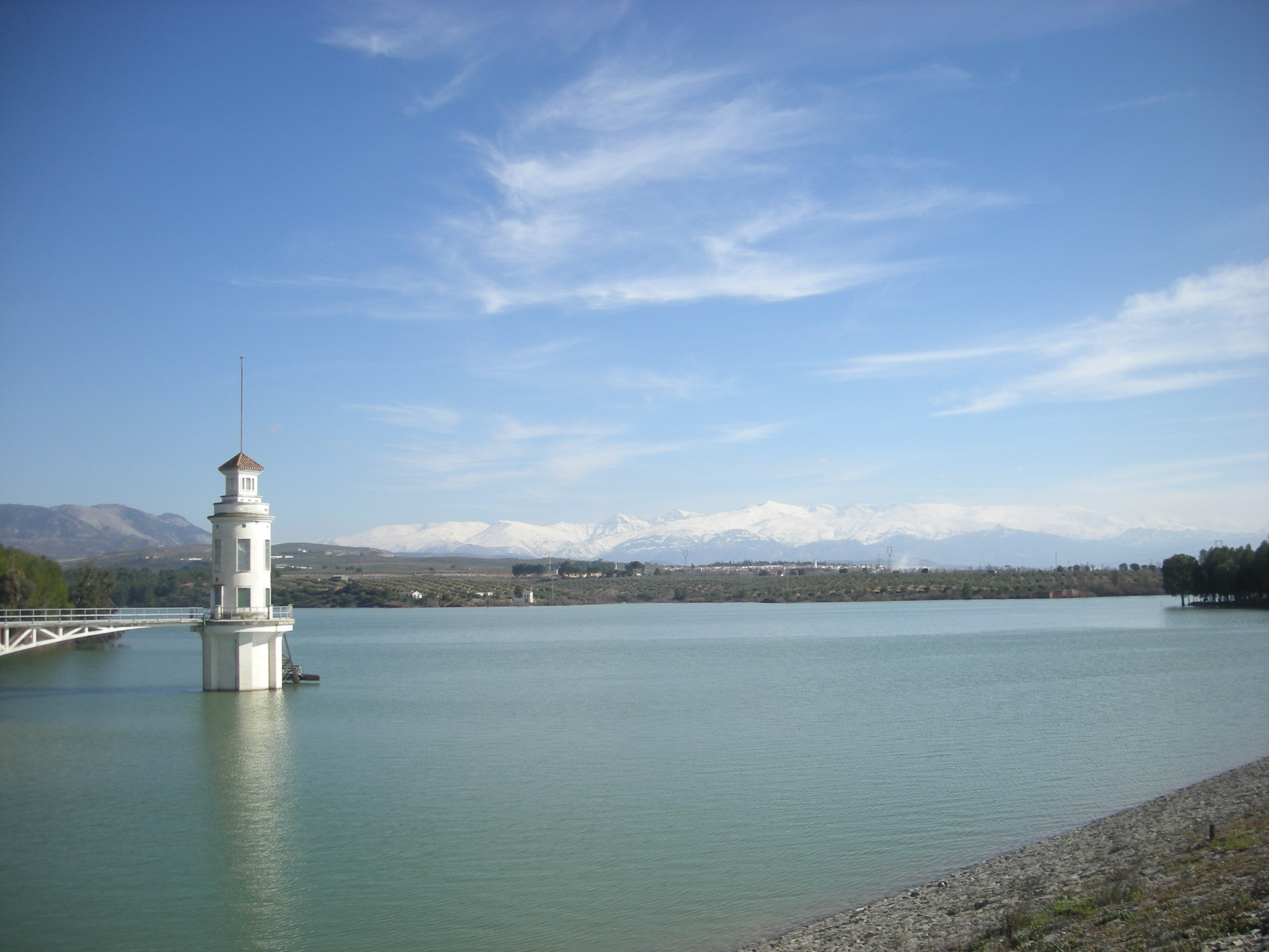 Embalse del Cubillas, con la Sierra Nevada al fondo